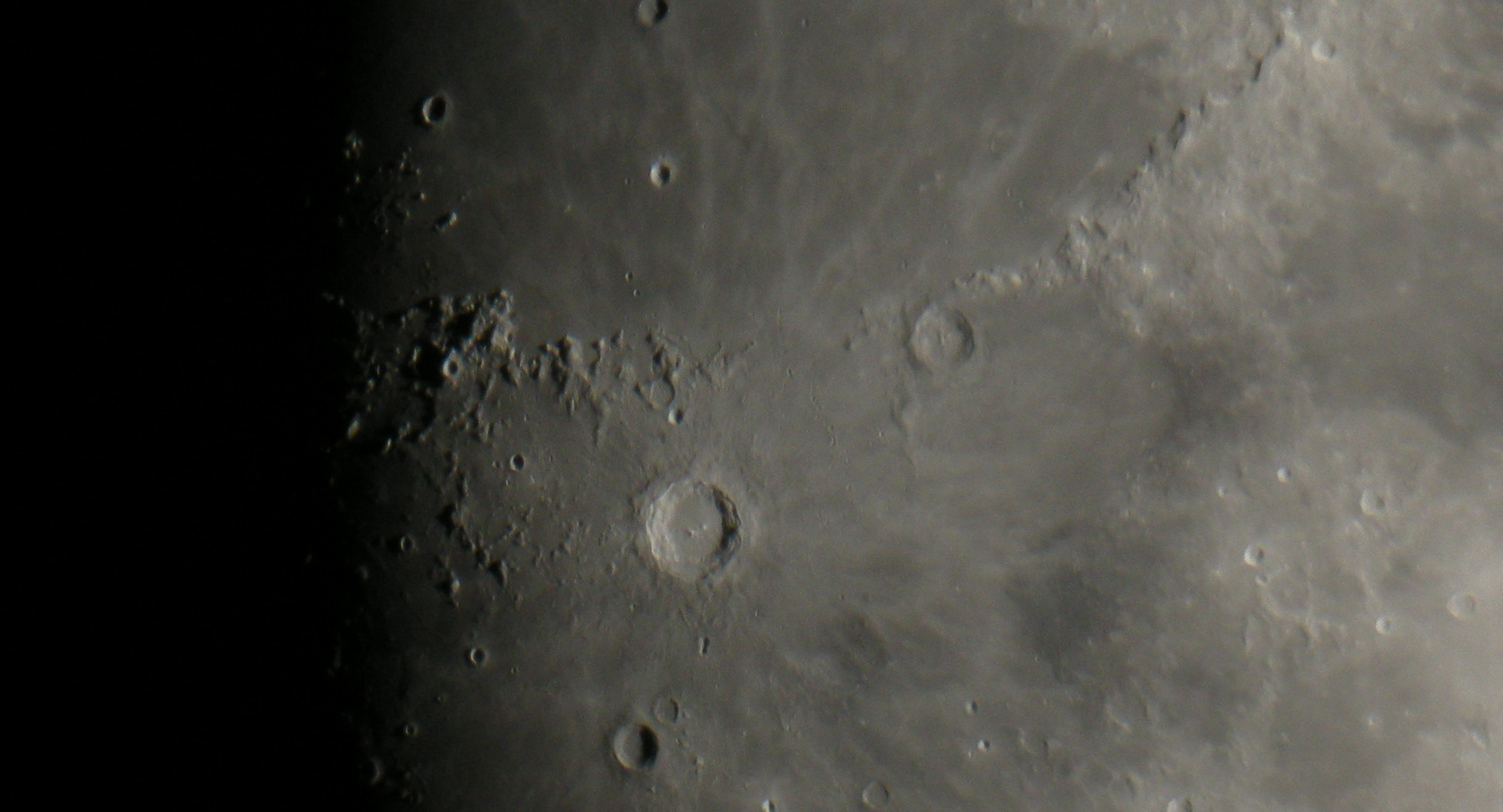 Fr : Photo prise avec un Nikon Coolpix P5000 mis en afocal derrière un téléscope "Celestron C8" de 2000 mm de focale équipé d'un oculaire de 40 mm de focale. En : Photo taken with Nikon Coolpix P5000 put in afocal behind a telescope "Celestron C8" of 2000 mm focal distance equipped with an eyepiece of 40 mm focal distance.